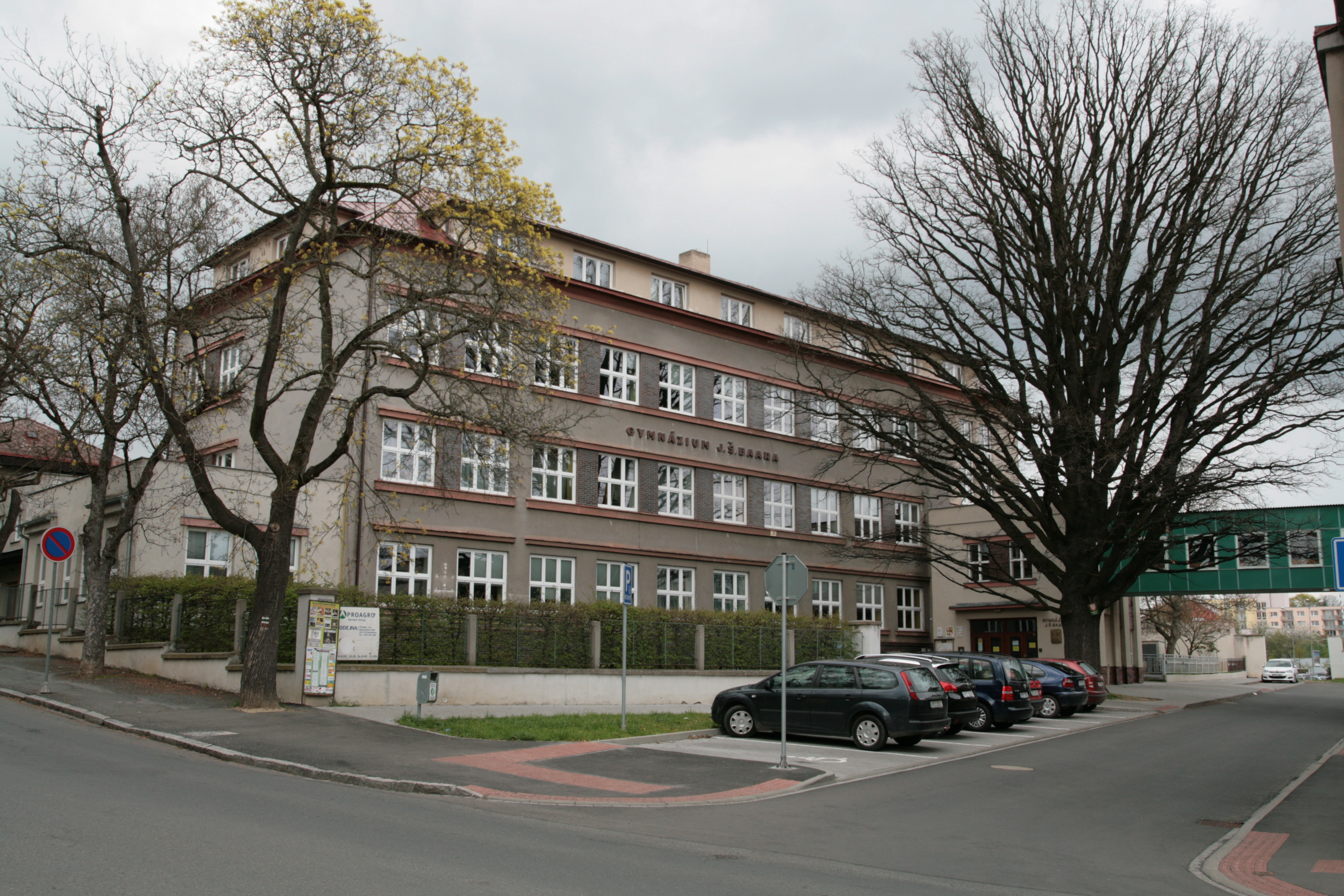 Město Domažlice. Gymnázium J. Š. Baara v Pivovarské ulici čp. 323. Pohled od křižovatky s Benešovou ulicí.